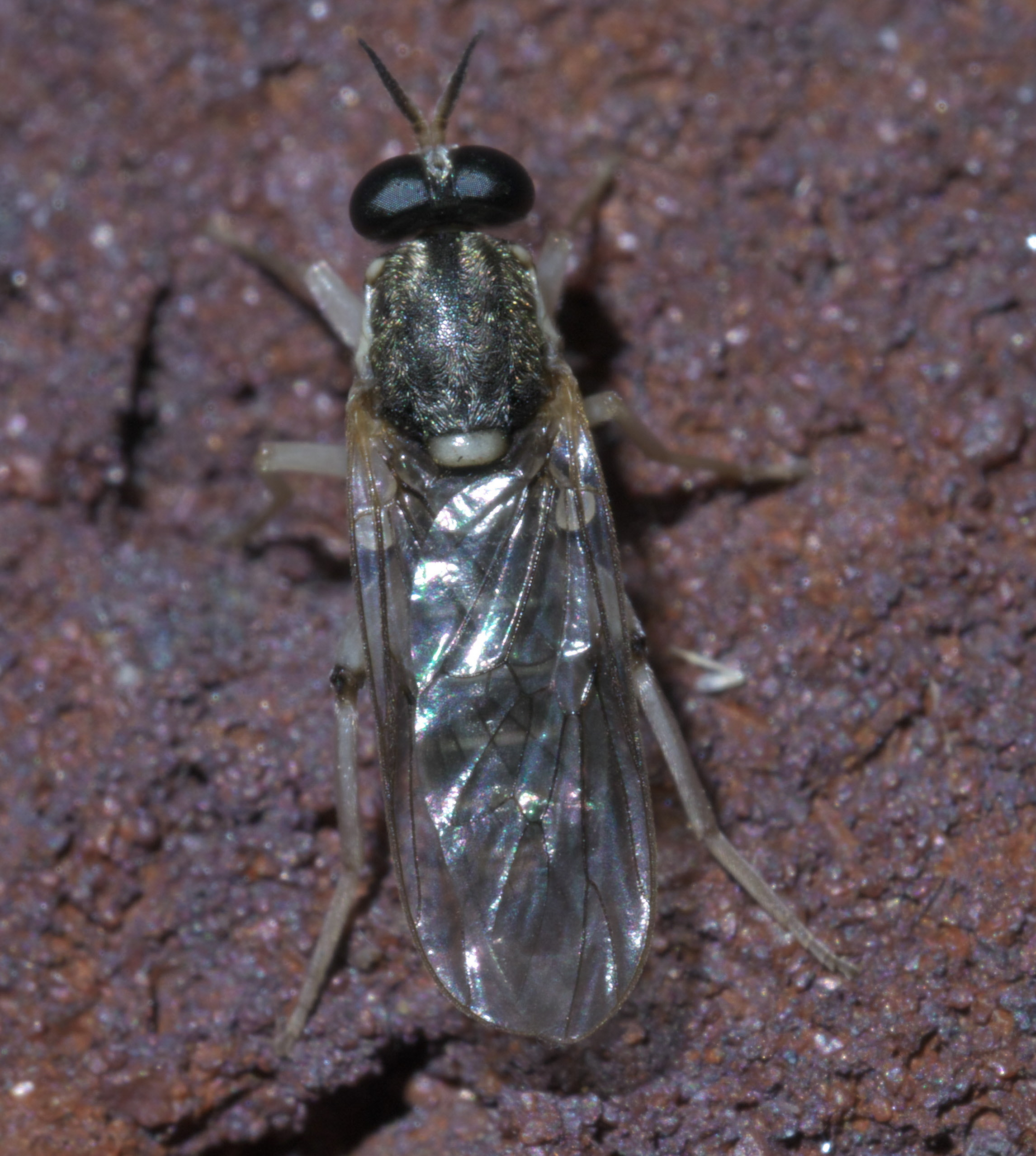 Solva pallipes, Order: Flies, Size: 7.5 mm, ID Confidence: 87